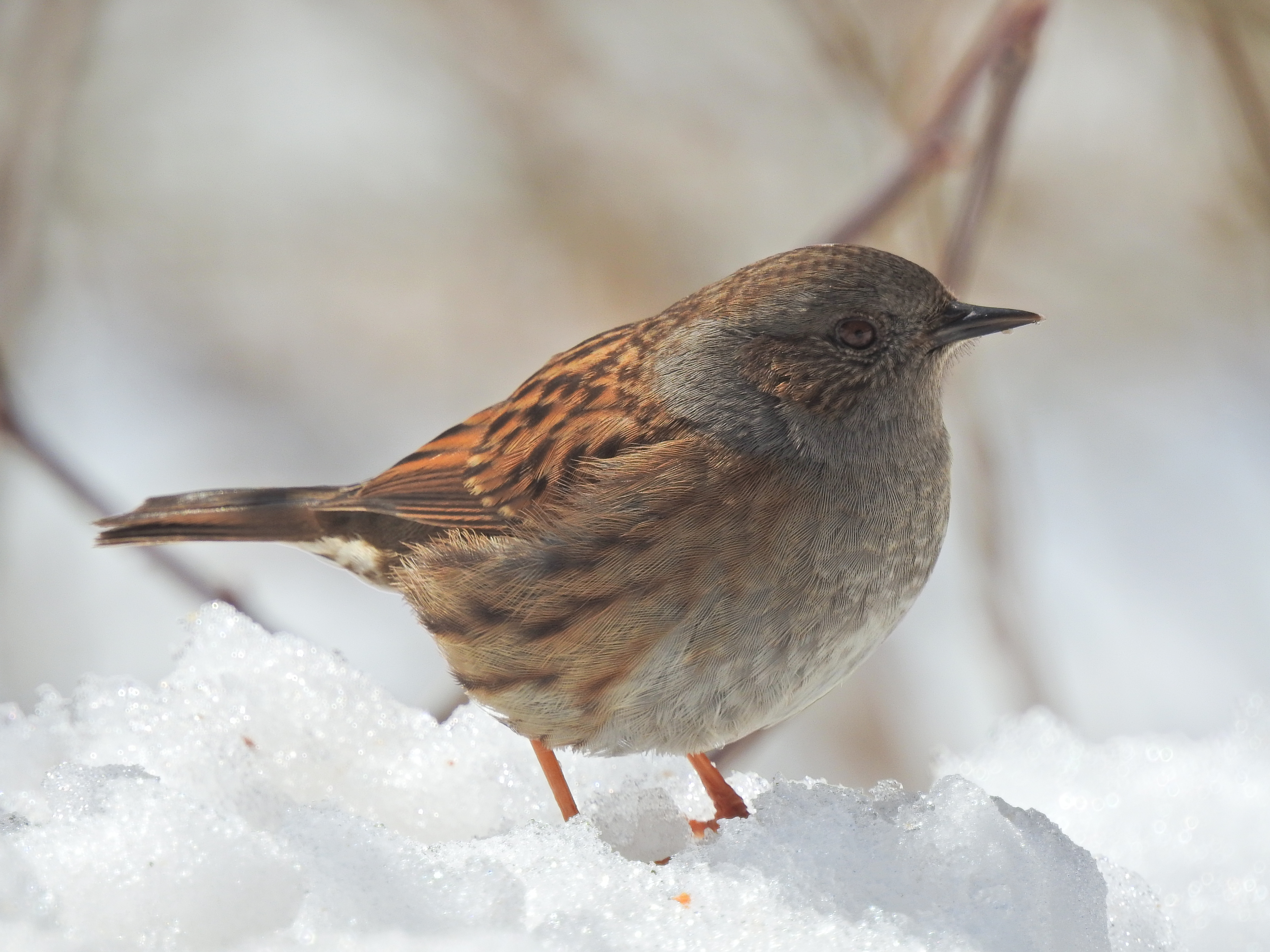 dunnock Heckenbraunelle brumăriţă de pădure